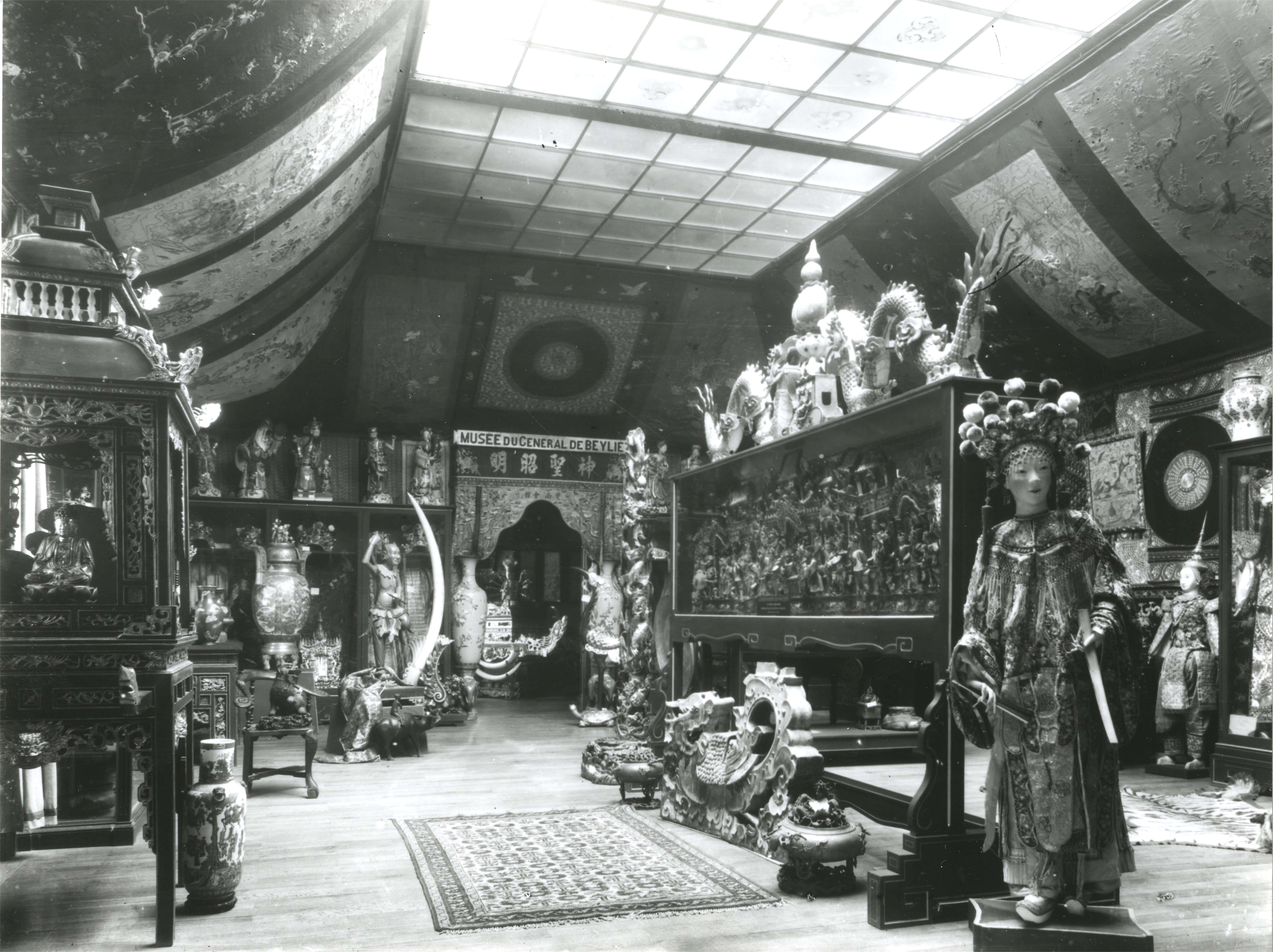 Salle dédiée au général Léon de Beylié en 1905 au musée-bibliothèque de Grenoble.